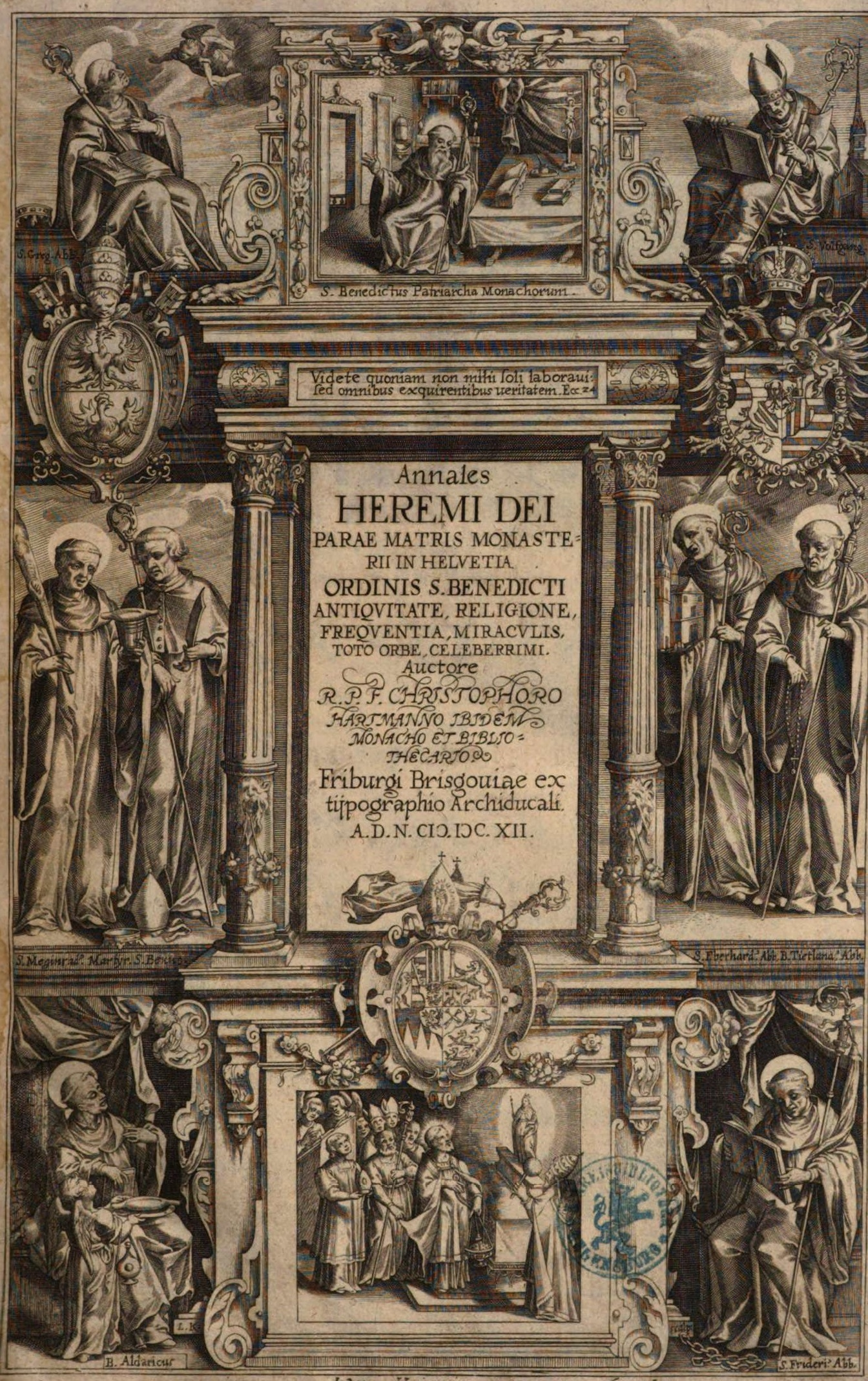 Christoph Hartmann: Annales Heremi Deiparae Matris Monasterii In Helvetia, Freiburg i. Br. 1612, erste Geschichte des Klosters Einsiedeln